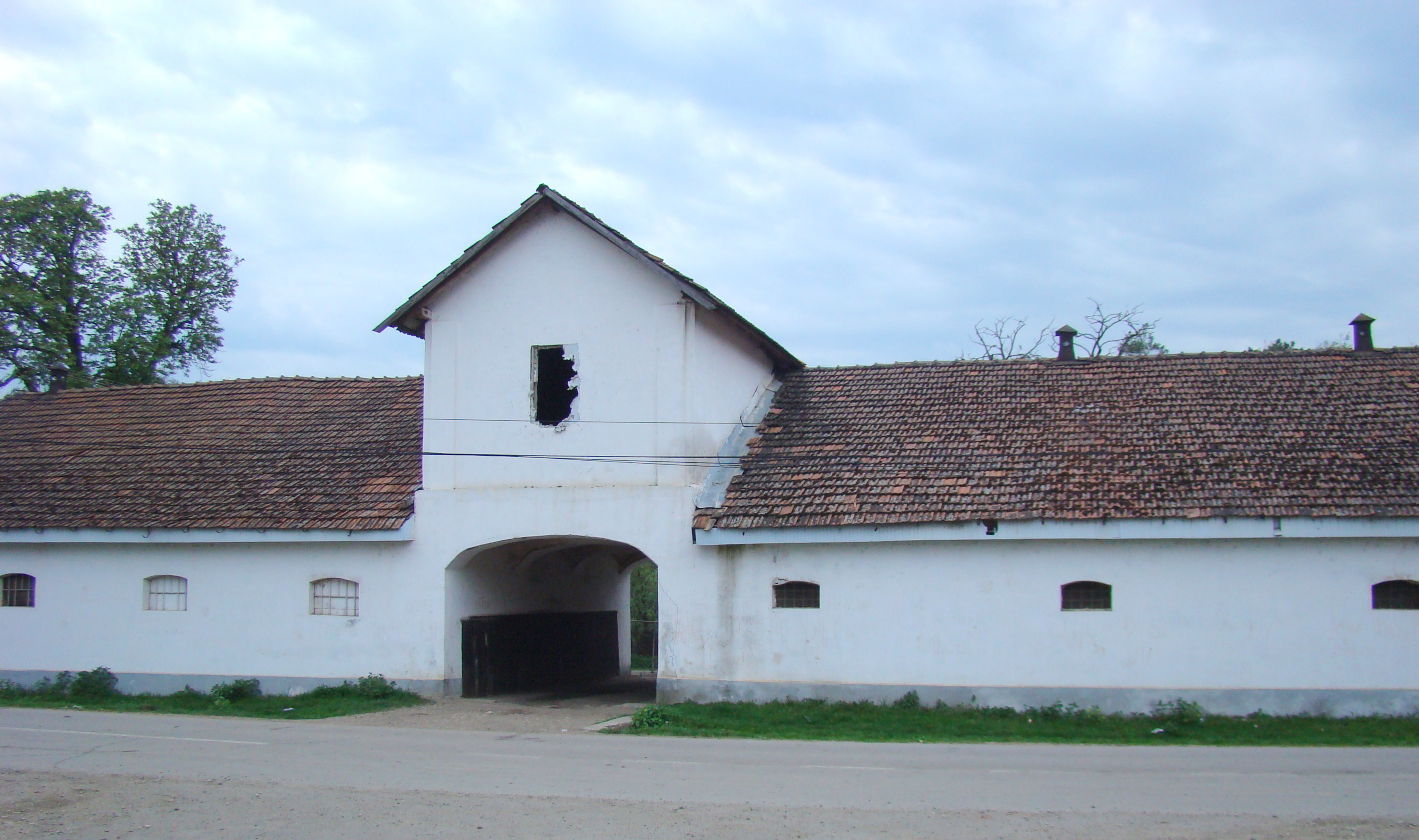 Ansamblul castelului Bethlen, sat Dragu; comuna Dragu, judeţul Sălaj